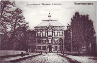 Епархиальное женское училище г. Екатеринодара